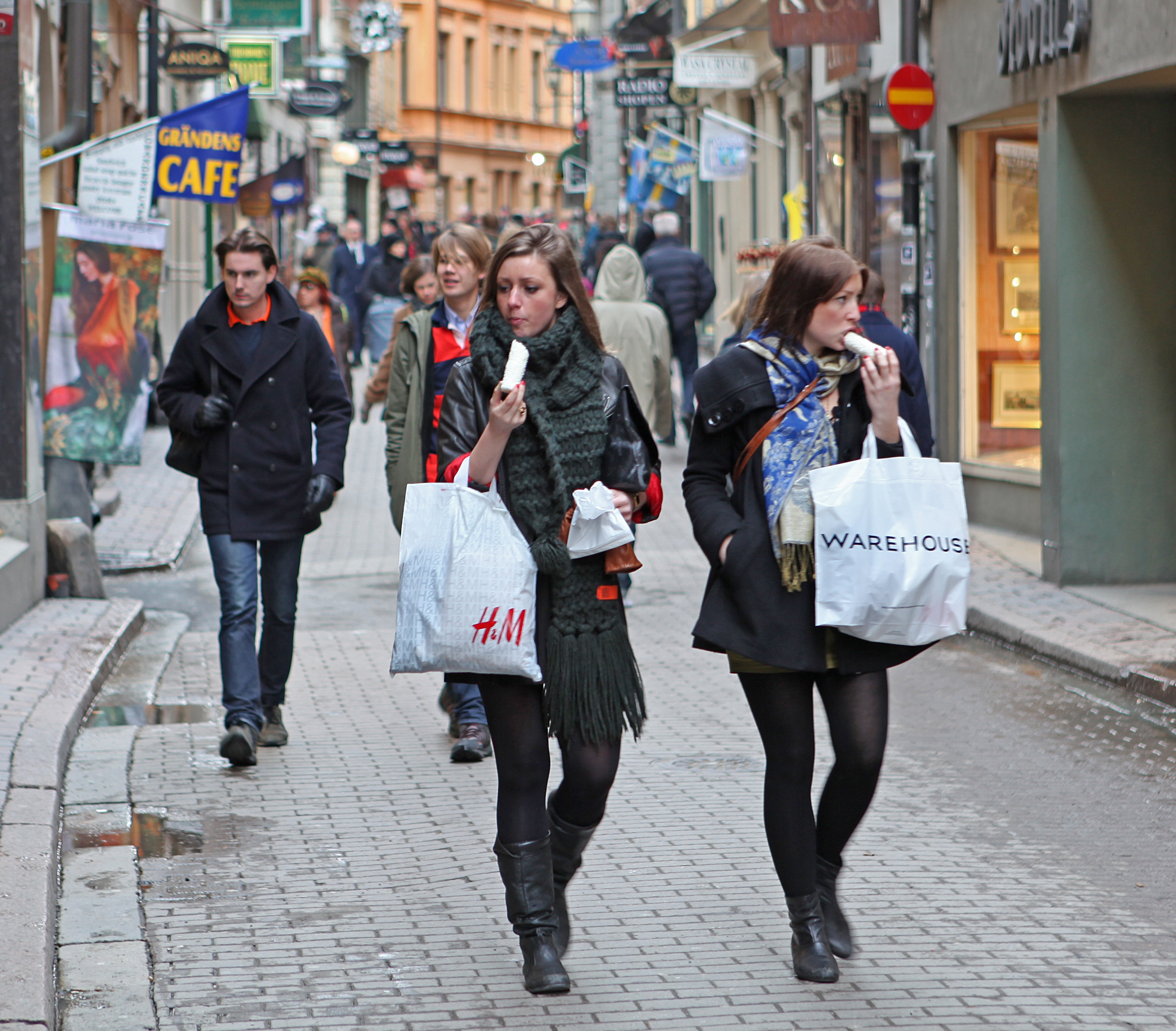 Old Town Stockholm